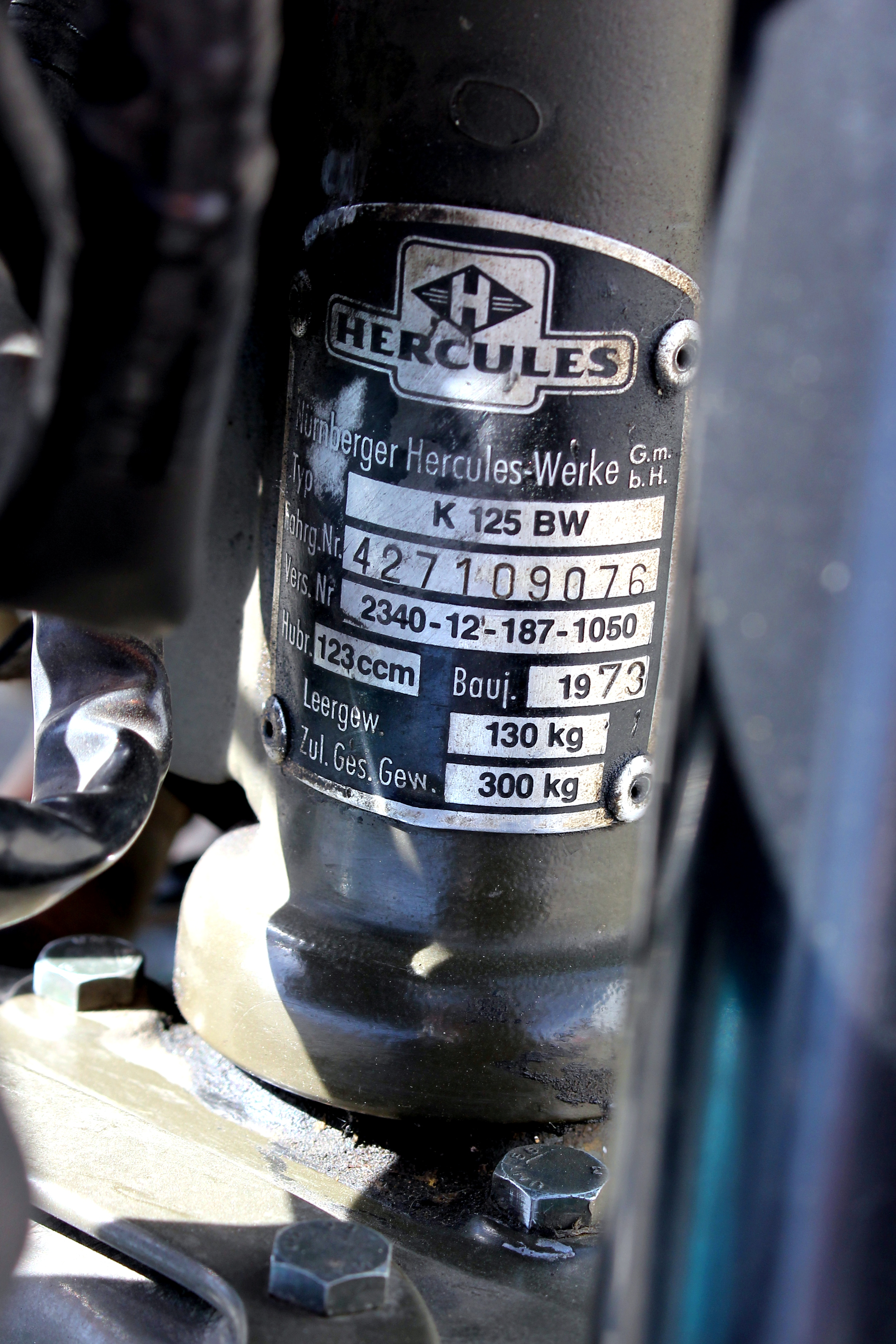 Typenschild einer Hercules K 125 BW, Baujahr 1973